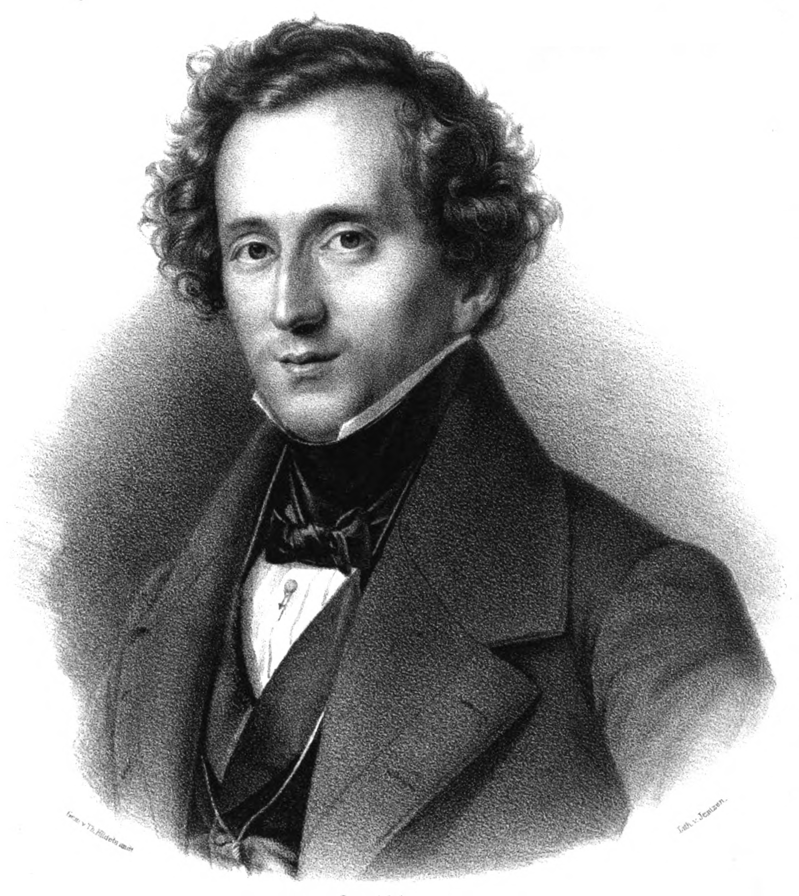 Felix Mendelssohn Bartholdy (1809-1847), Brustbild en face. - Lithographie von Friedrich Jentzen, gedruckt vom Königl. Lithograph. Institut Berlin nach einem Gemälde von Theodor Hildebrandt